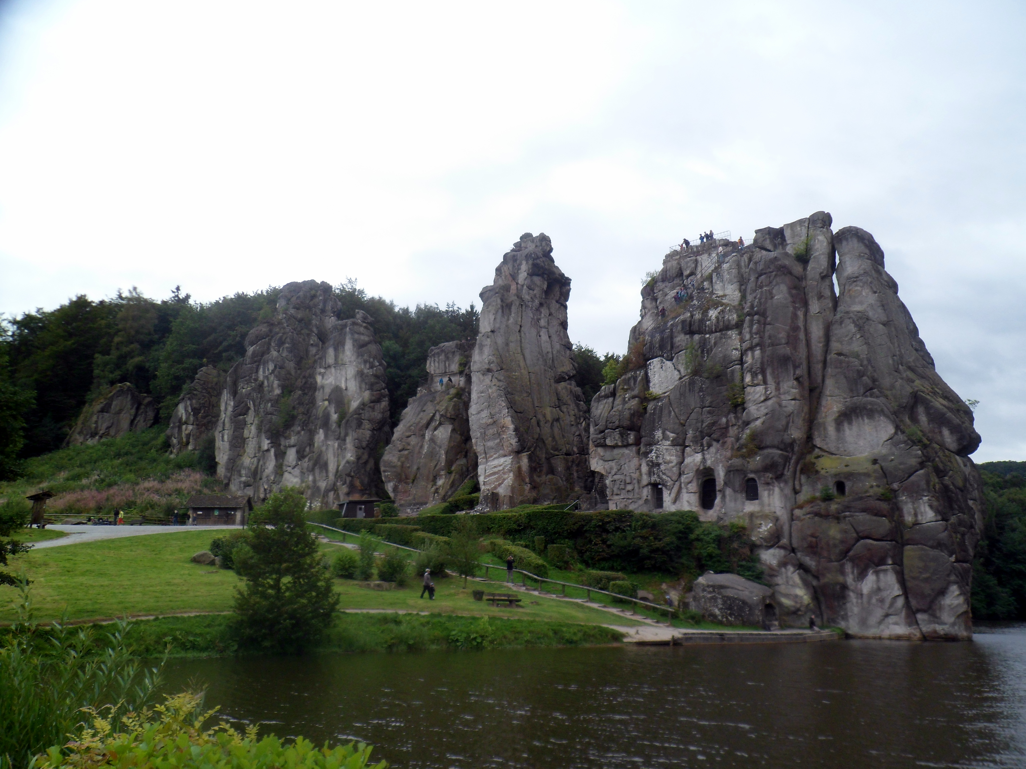 Das das Bald von den Externsteinen, das ich auf meiner Reise gemacht habe.